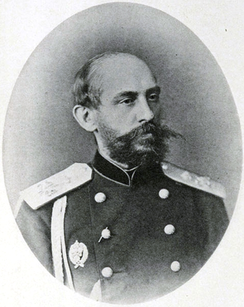 Николай Иванович Бо́бриков (15 января 1839, Стрельна — 4 июня 1904 или 17 июня 1904, Гельсингфорс) — российский военный и государственный деятель. Генерал-губернатор Финляндии и командующий войсками Финляндского военного округа (1898—1904). Член Государственного совета; генерал от инфантерии (1897), генерал-адъютант (1898).